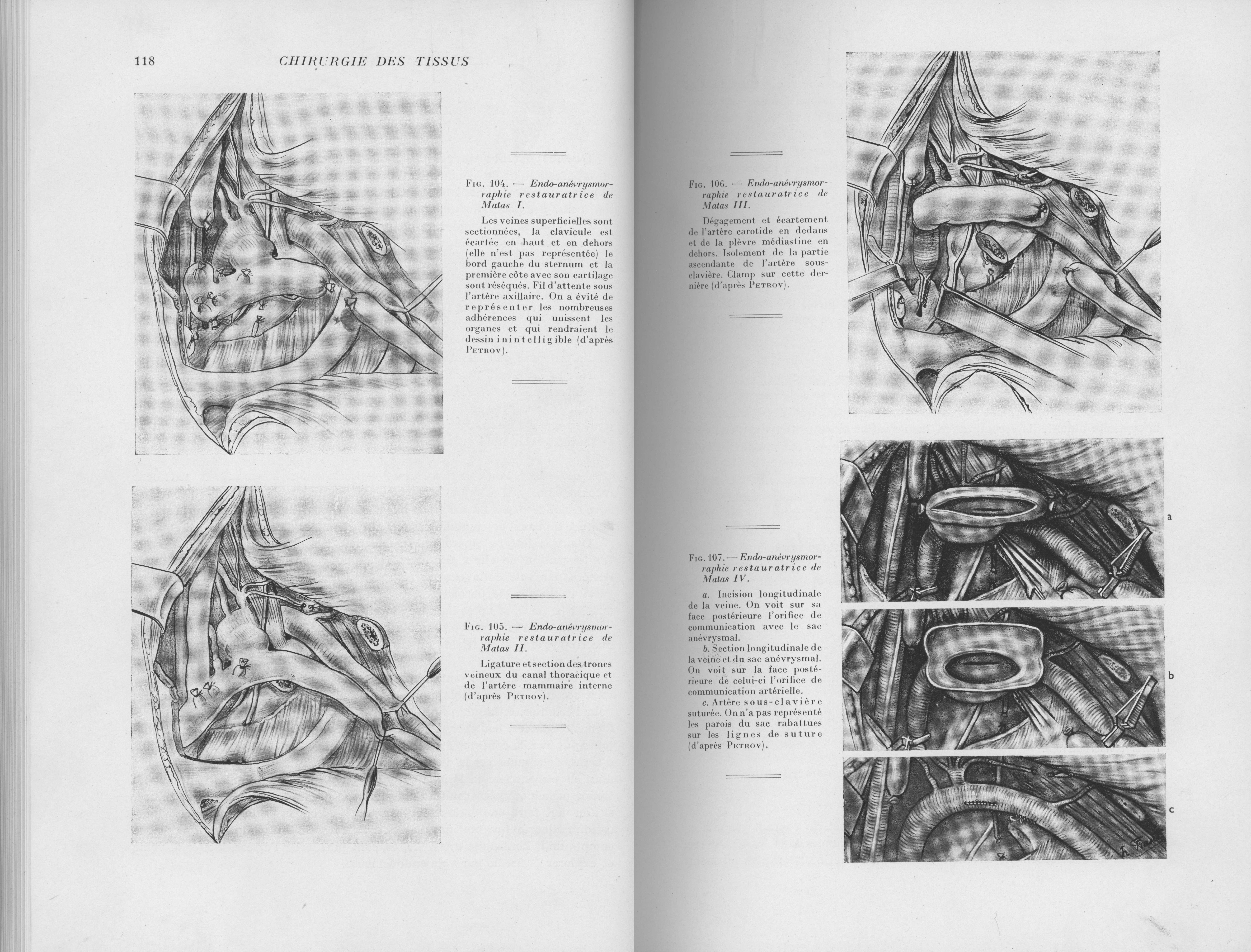 Fey B et al., Traite de Technique Chirurgicale, Tome I, 1955, Paris p. 118-119